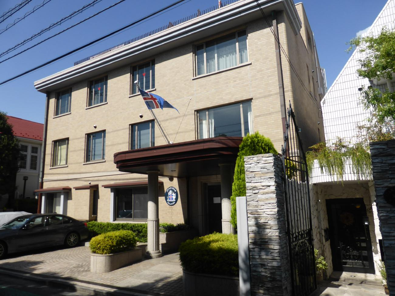 アイスランド大使館全景